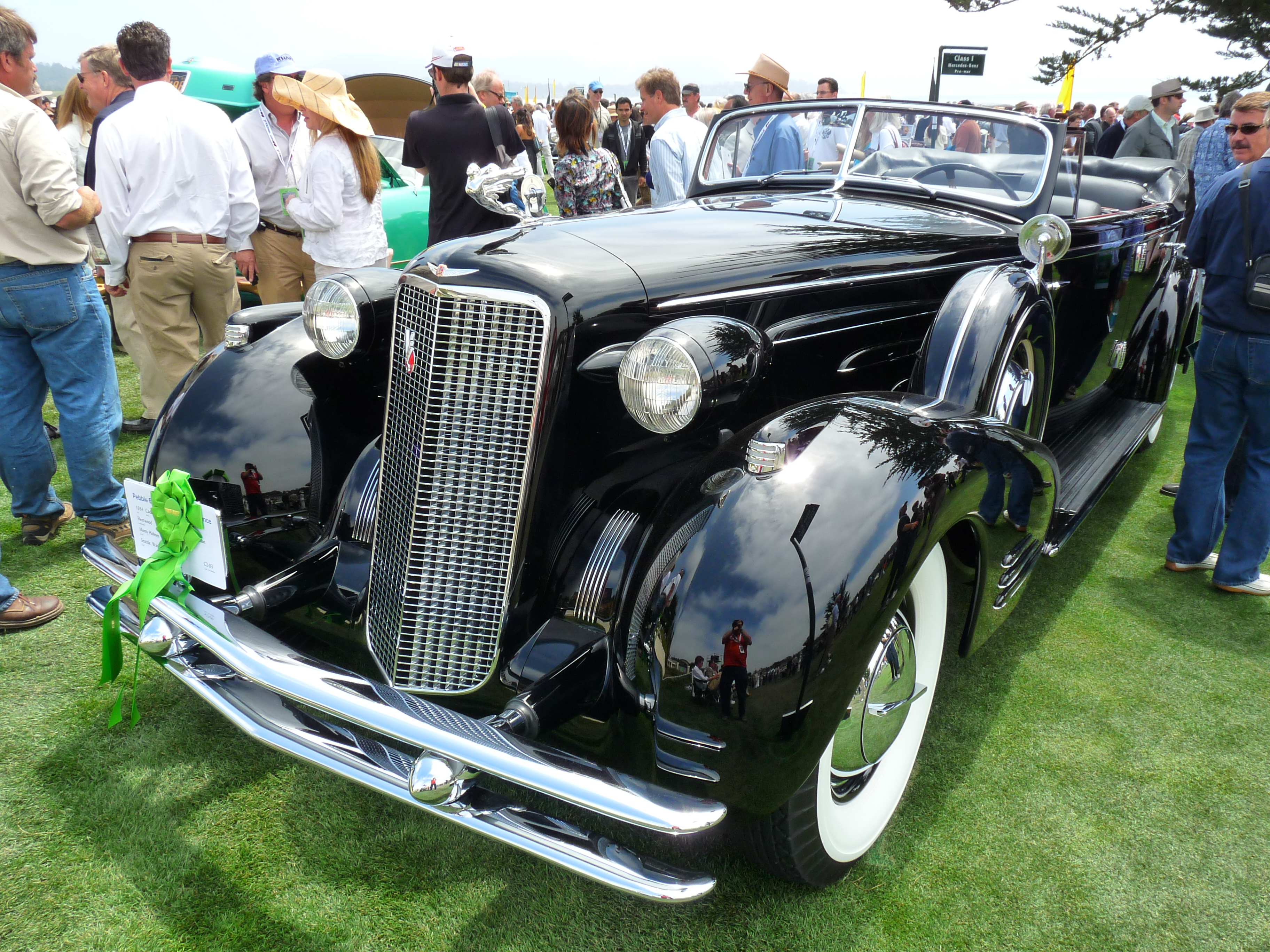 1934 Cadillac V-16